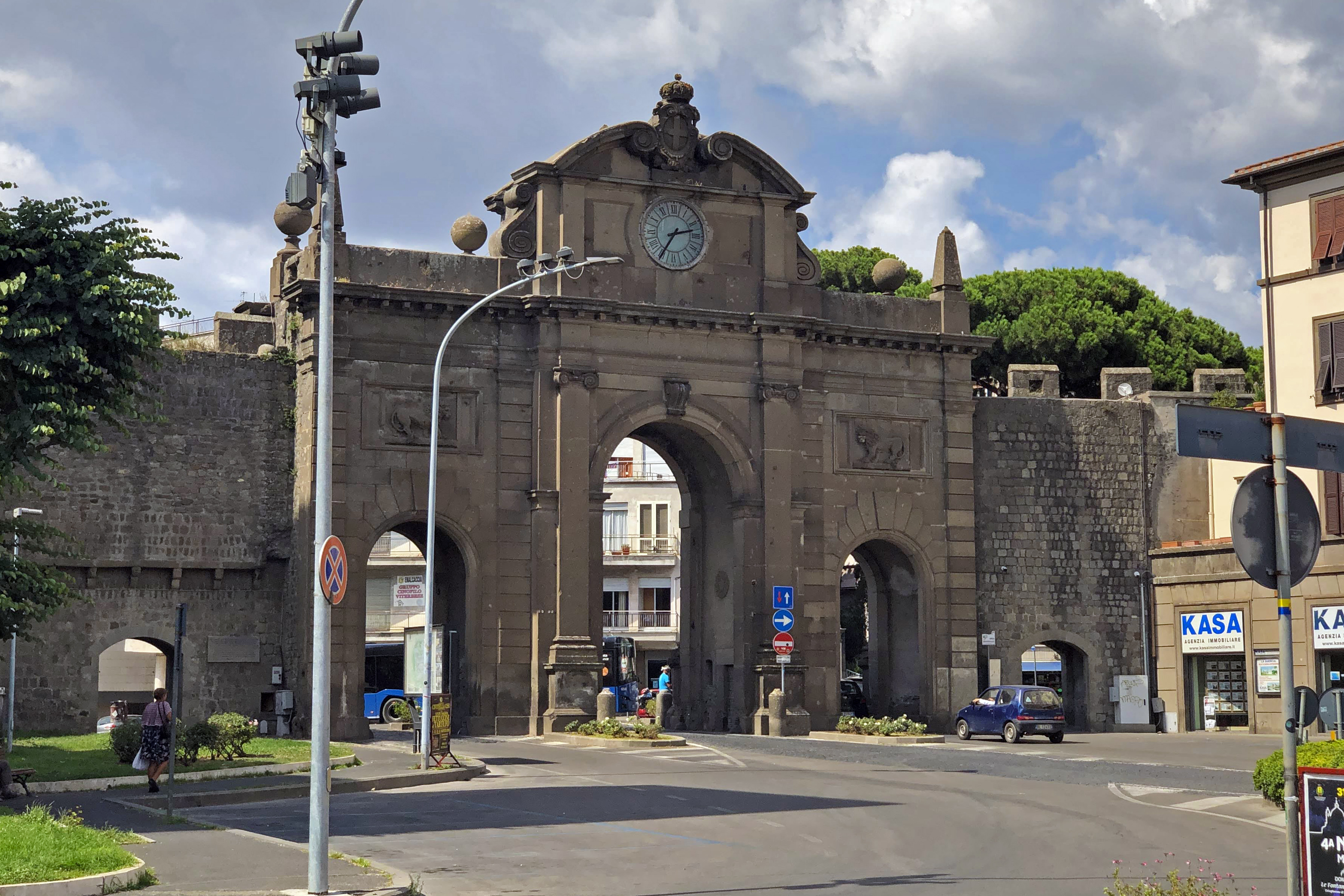 Porta Fiorentina in Viterbo, Lazio, Italia - agosto 2019